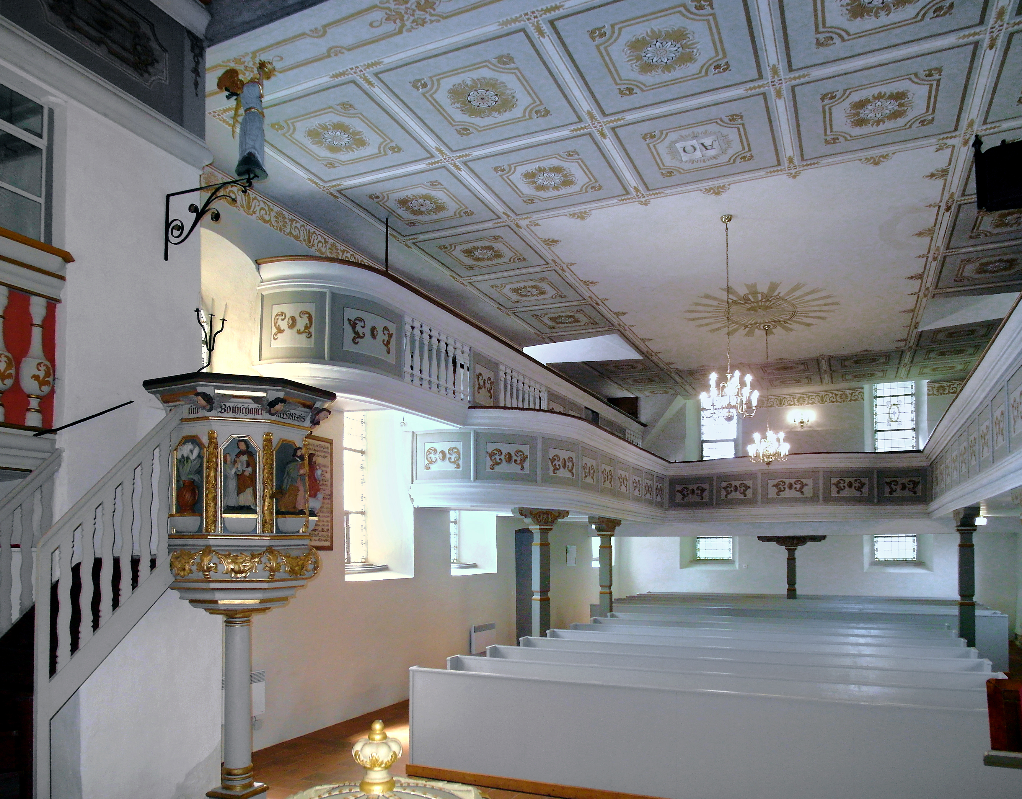 11.07.2018 09619 Helbigsdorf (Mulda): Evangelische Dorfkirche, Hauptstraße (GMP: 50.811503,13.365515). Spätgotik aus dem 14./15. Jahrhundert, 1576 und 1726 erweitert. Blick vom Altarraum nach Westen in den späteren Anbau. [SAM6755.JPG]20180711360DR.JPG(c)Blobelt